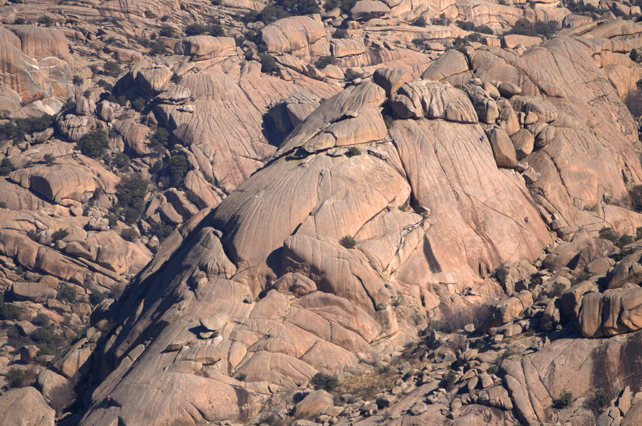 Roca madre - La Pedriza